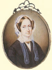 Maria Teresa d'Àustria-Toscana, reina de Sardenya (Viena 1801 - Torí 1855). Arxiduquessa d'Àustria i princesa d'Hongria, Bohèmia i Toscana amb el tractament doble d'altesa reial i imperial inherent als membre de la Casa dels Habsburg.